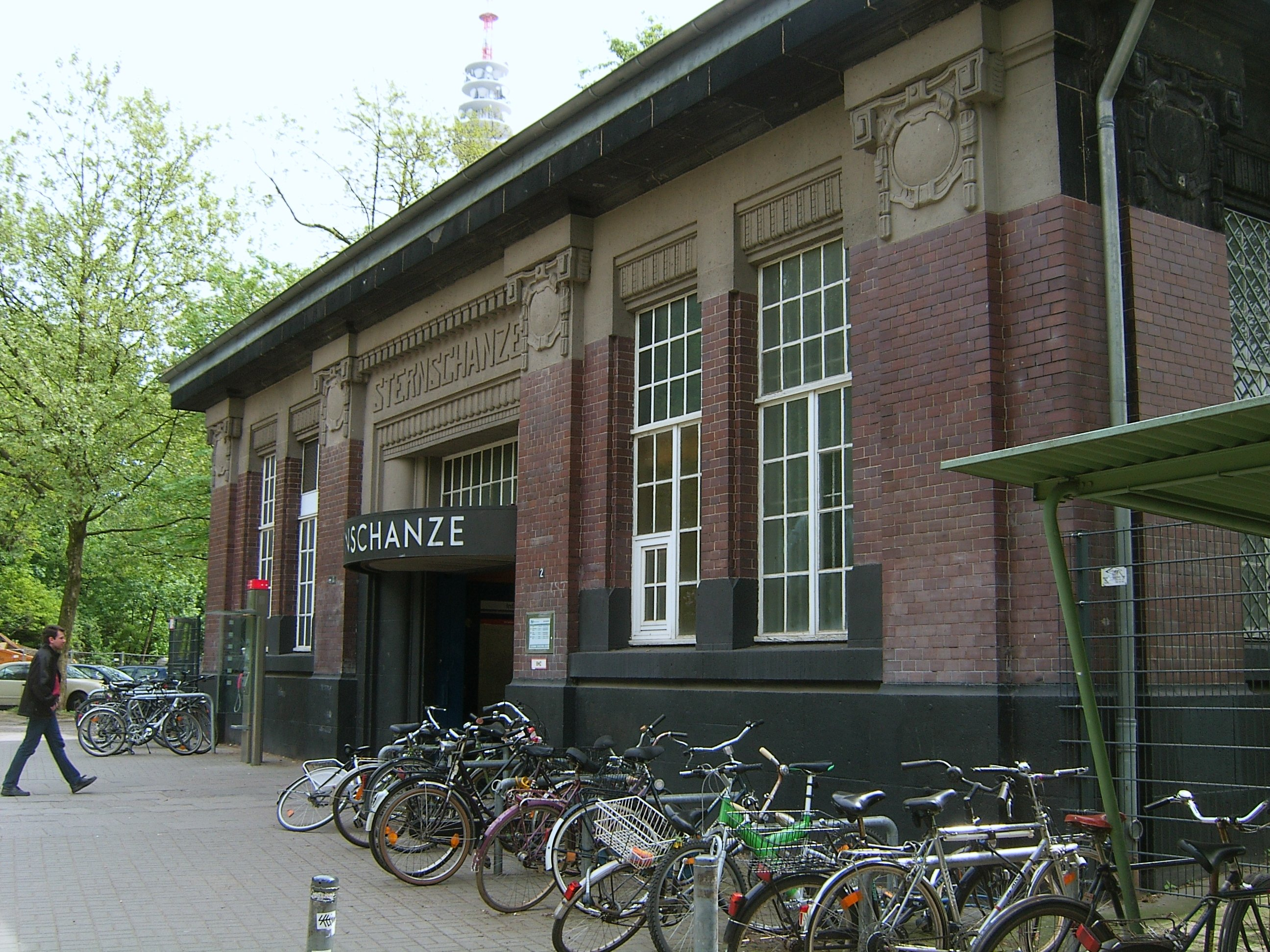 Zugangsgebäude des U-Bahnhofes Sternschanze im gleichnamigen Hamburger Stadtteil.